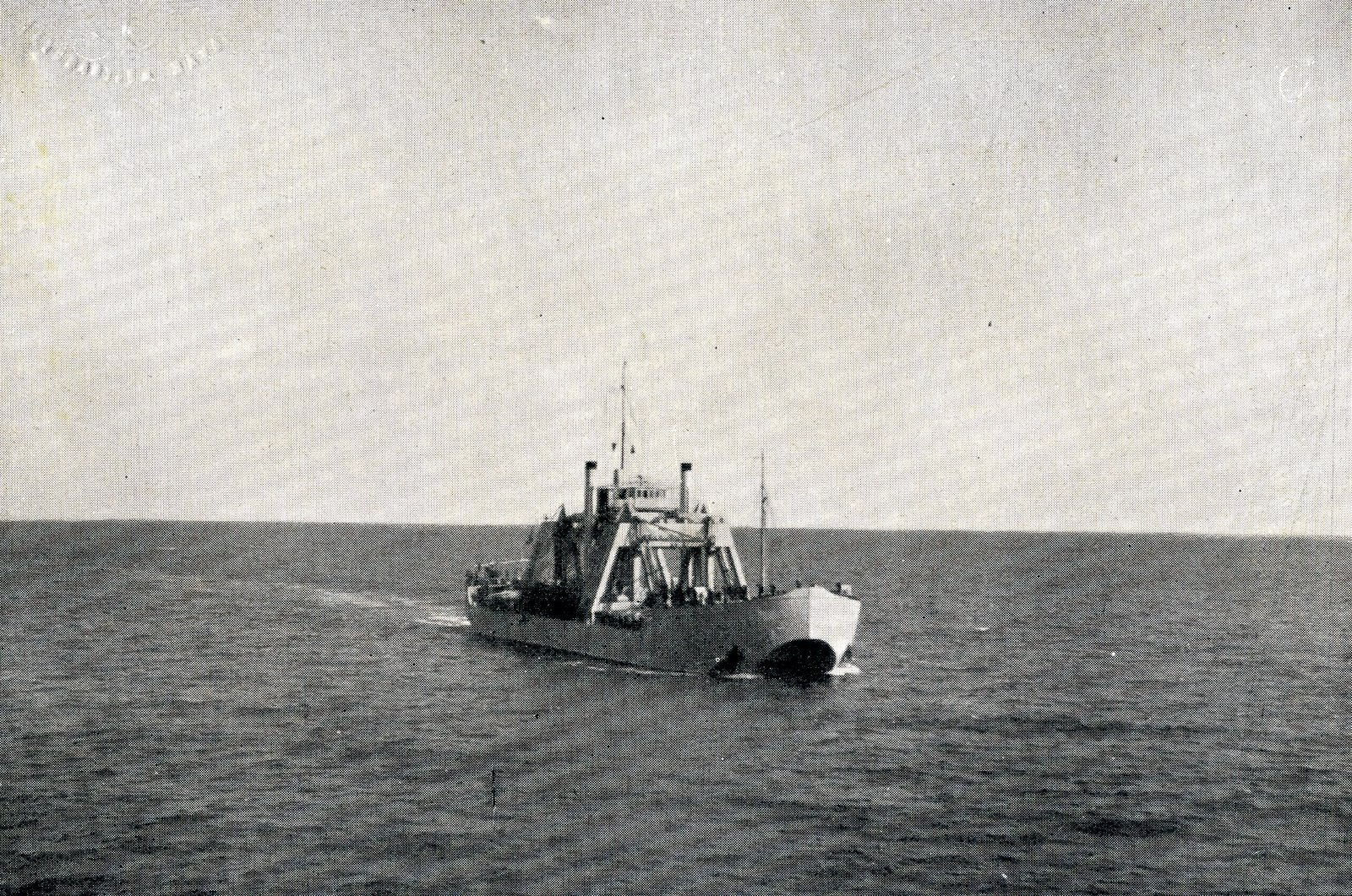 Buque de Salvamento de Submarinos Kanguro en el transcurso de unas maniobras.